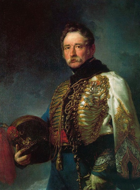 Retrato del militar y politico español Juan de Zavala y de la Puente (1804-1879), que llegó a ser presidente del Consejo de Ministros en 1874, durante la Primera República Española, y que en este retrato, ejecutado en 1839 por Vicente López Portaña, aparece con el uniforme del regimiento de los Húsares de la Princesa.